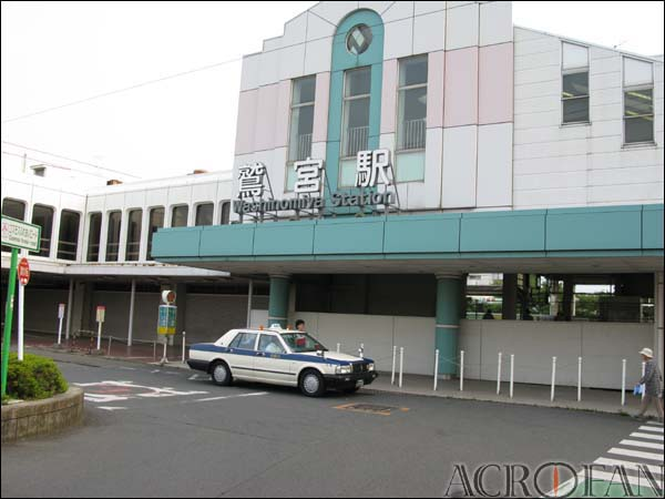 와시노미야 역의 전면